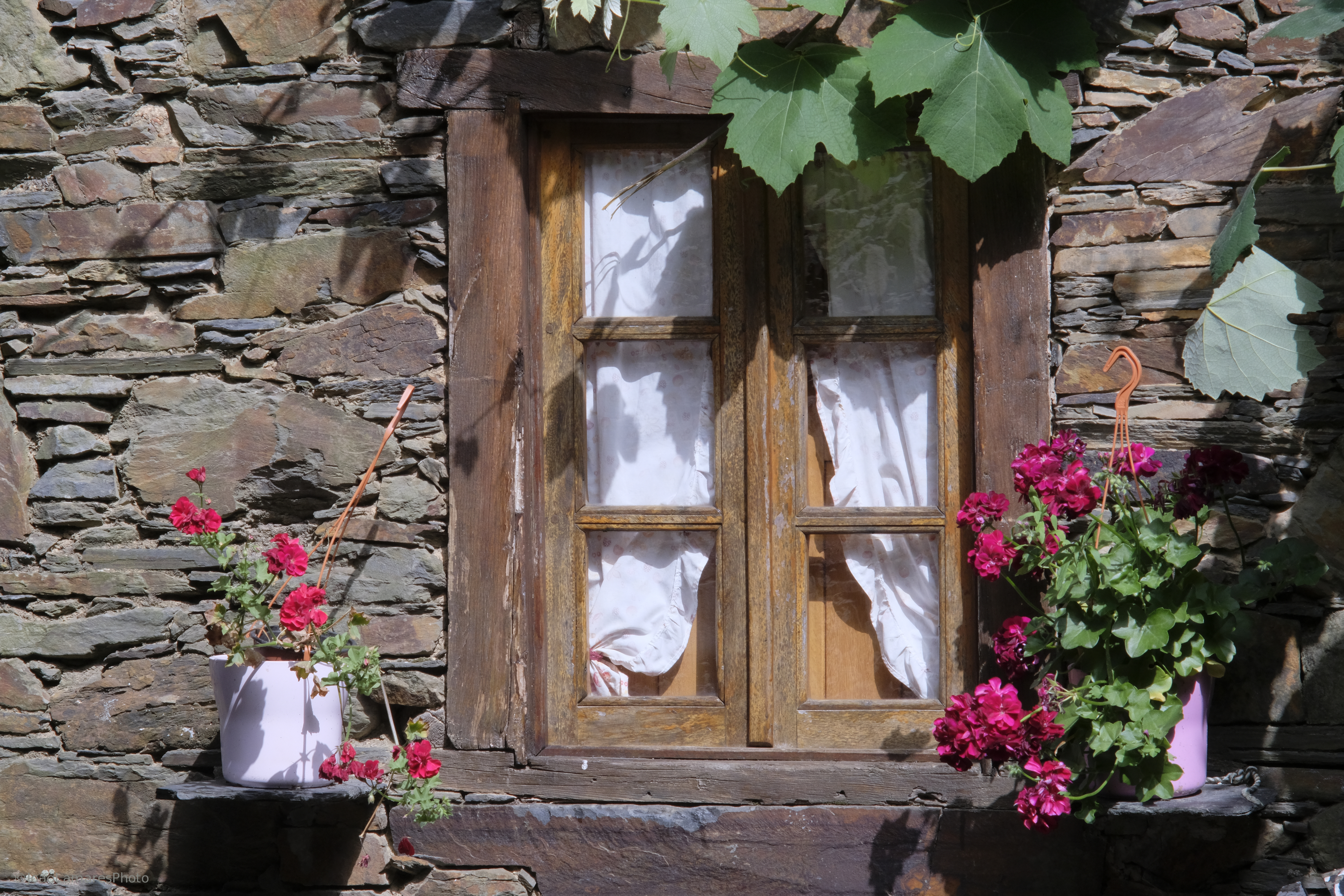 Serra da Lousã, Talasnal, Aldeias de Xisto. O Talasnal é uma aldeia serrana da Serra da Lousã,[1][2] situada no concelho da Lousã, freguesia da Lousã e Vilarinho.[3][4][5] A aldeia está integrada na Rede das Aldeias do Xisto[6] e faz parte da lista de Sítio de Importância Comunitária Serra da Lousã - Rede Natura 2000. Integra a União de freguesias de Lousã e Vilarinho[7] ... Pensa-se que a fundação desta aldeia assim como das que a rodeiam deve ter acontecido algures pela 2ª metade do século XVII ou pelo começo do século XVIII, chega-se a esta conclusão porque no Cadastro da população do reino (1527) não faz menção alguma a estas aldeias o que sugere que até à fixação das gentes a ocupação seria realizada por pastores nas estações da primavera e do verão. A primeira referência ao Talasnal provem de uma multa executada pela Câmara da Lousã em 1679. (Wipedia; Talasnal) This is a photography of a protected area of Portugal indexed in the World Database on Protected Areas with the ID: 555531128 (WDPA)